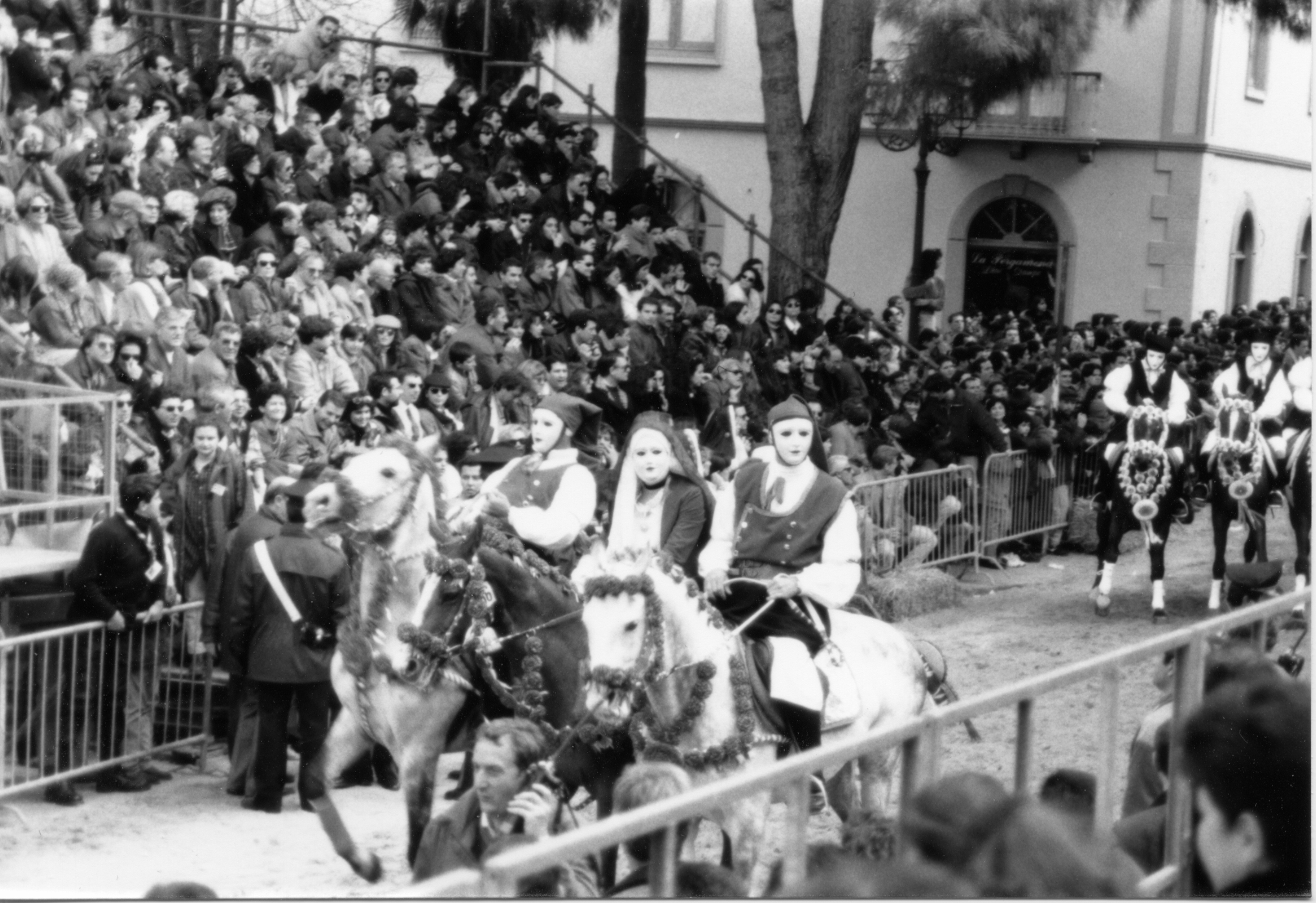 Oristano, Sardegna, Italia